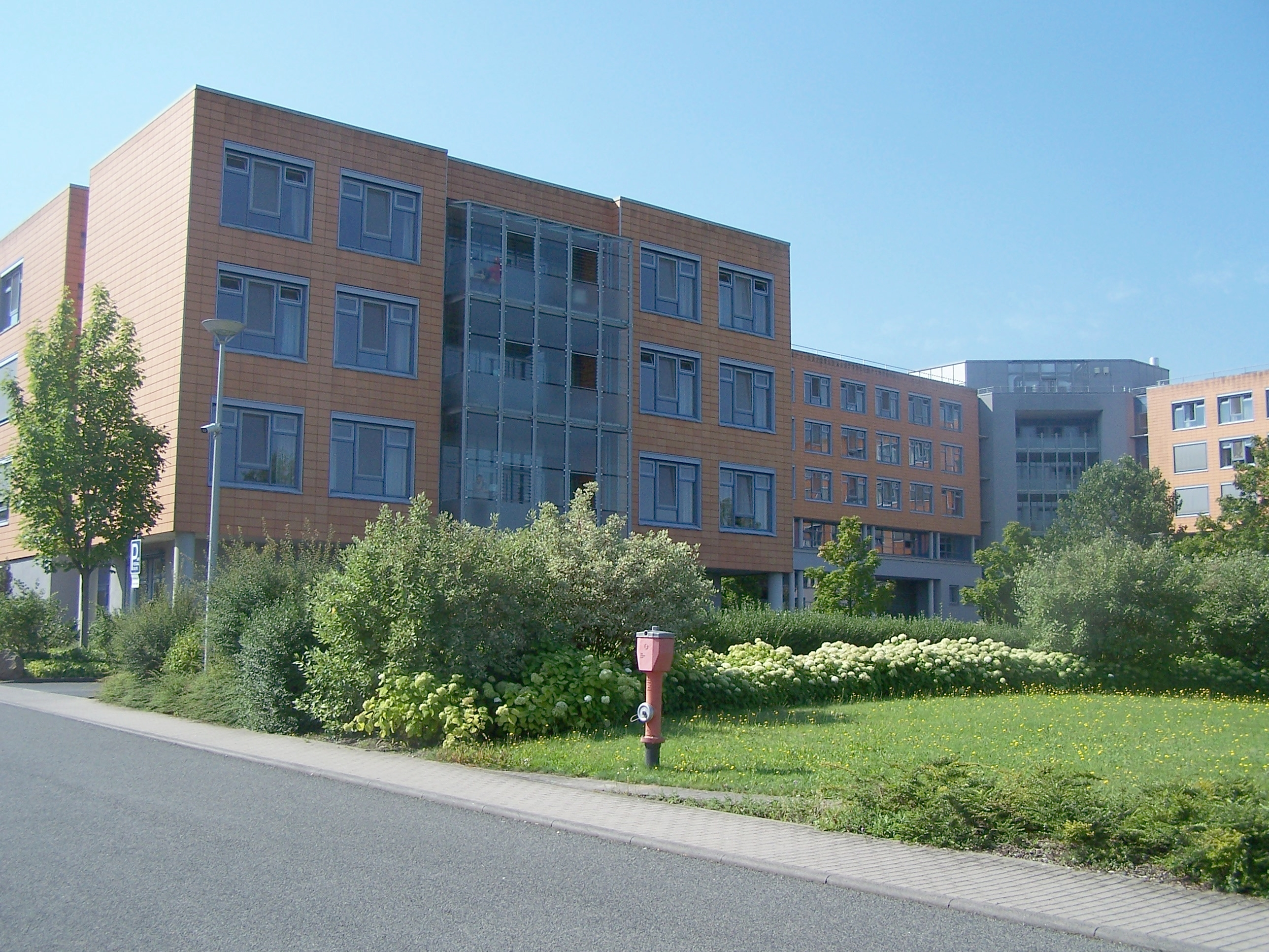 Das Klinikum in Bad Salzungen, Lindigallee.